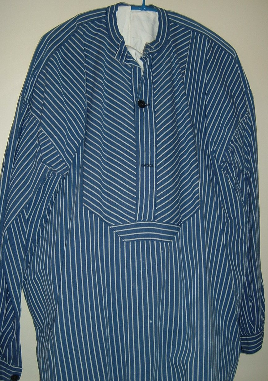 traditionelles Fischerhemd (Finkenwerder Style) aus Hamburg